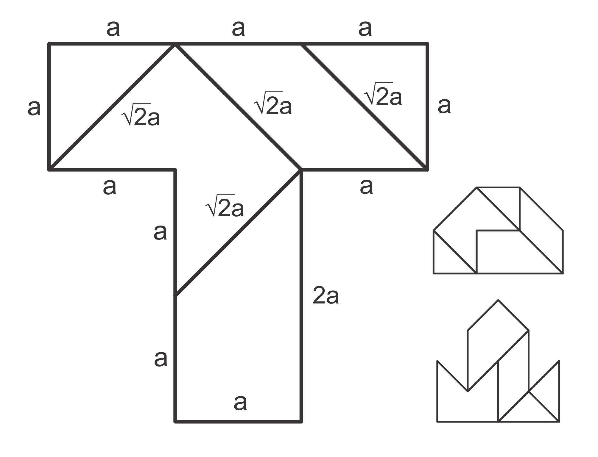 The Small T1 Số hình xếp được: 59